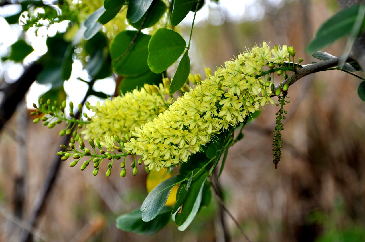 Haematoxylum campechianum (Campêche) est utilisé spécialement pour l'extraction du colorant hématoxyline.